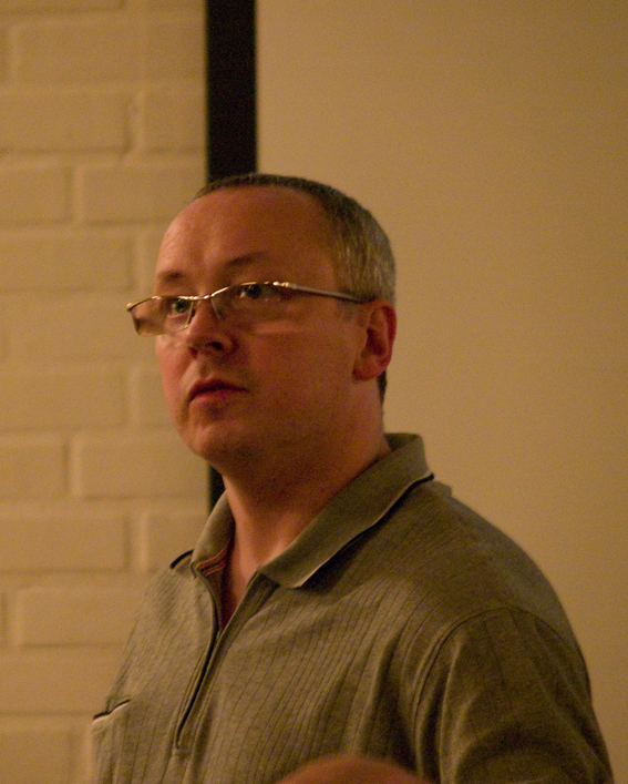 Portræt af Michael Linden-Vørnle